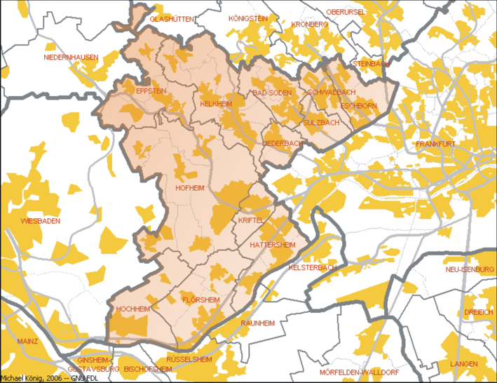 Beschreibung: Karte des Main-Taunus-Kreises bei Frankfurt am Main Urheber: Michael König (Magadan) Datum: 8. Februar 2006 Sonstiges: überarbeitet von presse03 Ursprungsname: Mk Frankfurt Karte MTK.png